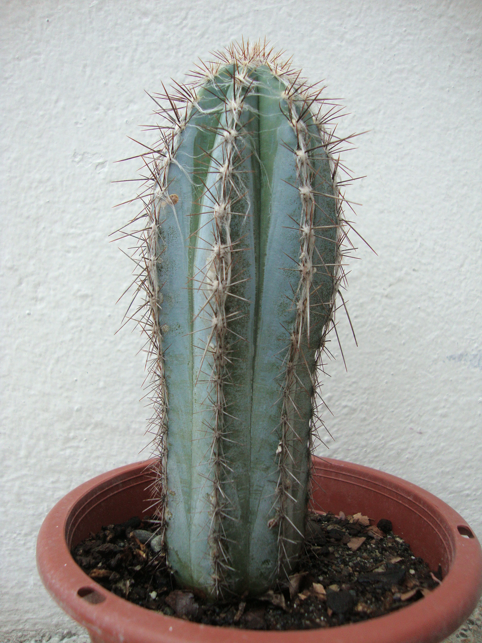 Pilosocereus tweedyanus = Pilosocereus lanuginosus subsp. colombianus